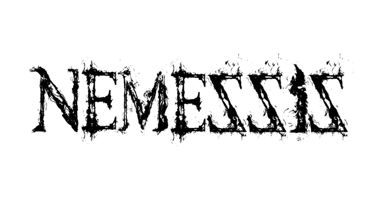 Nemessis Logotype